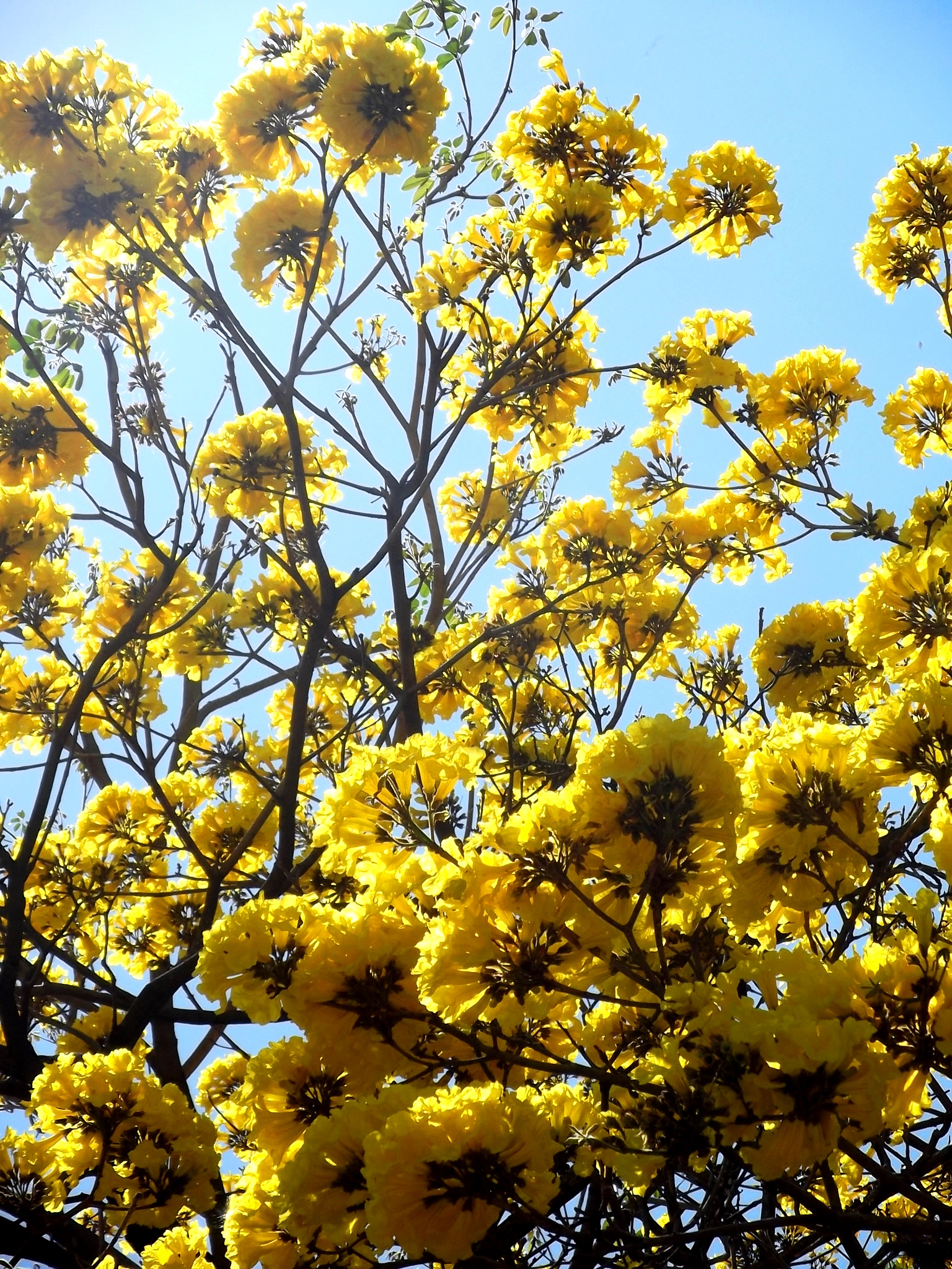 Carabobo, Naguanagua